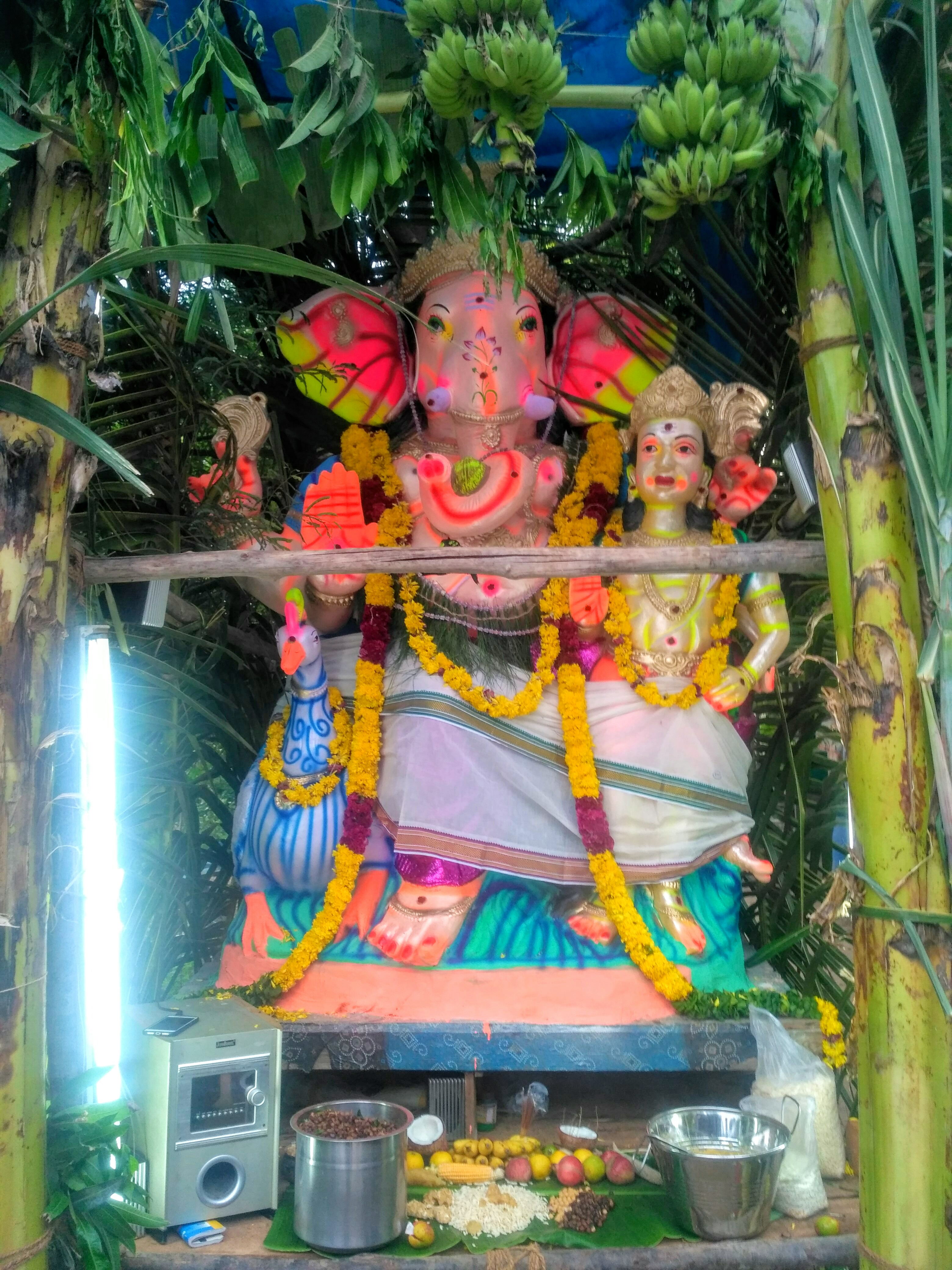 தமிழ்நாட்டின், விழுப்புரம் மாவட்டத்தில் உள்ள பெரியபாபுசமுத்திரம் ஊராட்சியில் எடுக்கப்பட்ட விநாயகர் சிலை புகைப்படம்...